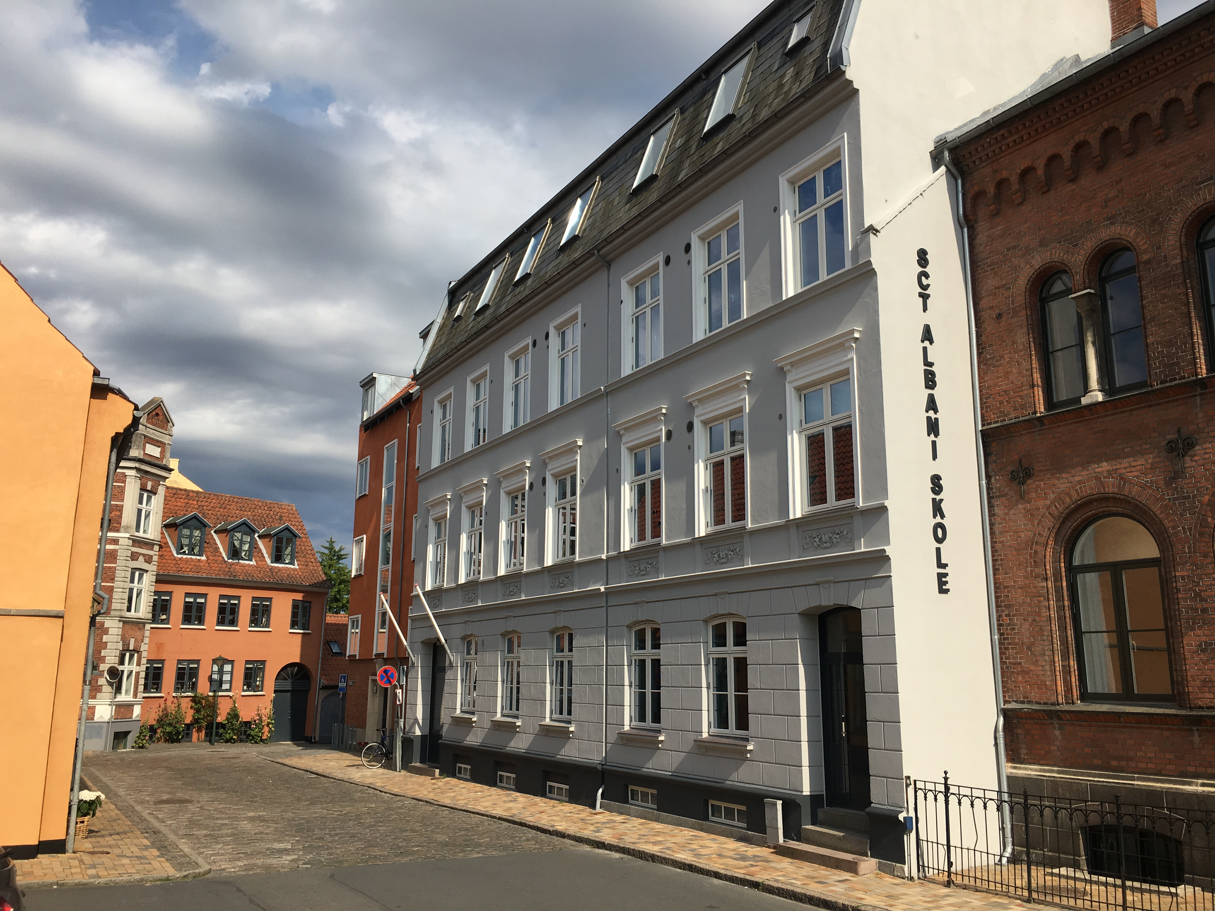 Sankt Albani Skole